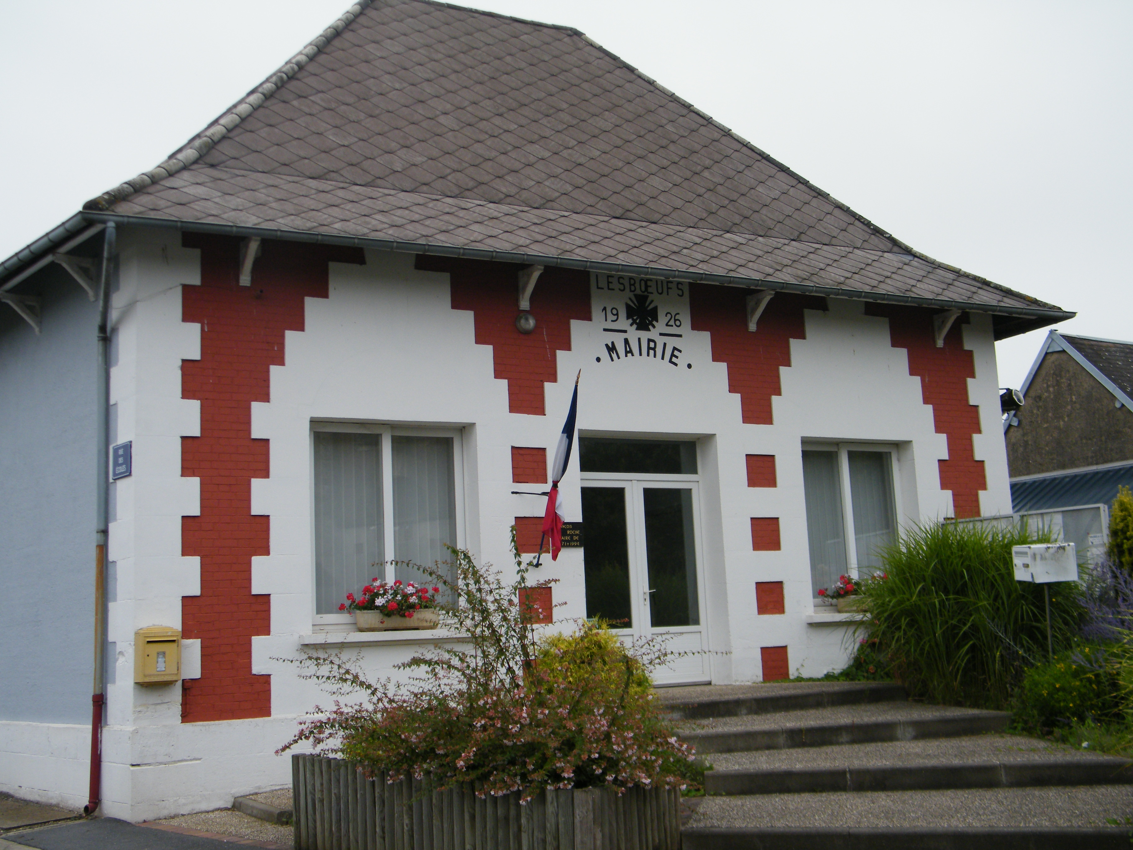 Mairie, avec croix de guerre en fronton, reconstruite après la guerre 1914-1918, en 1926.